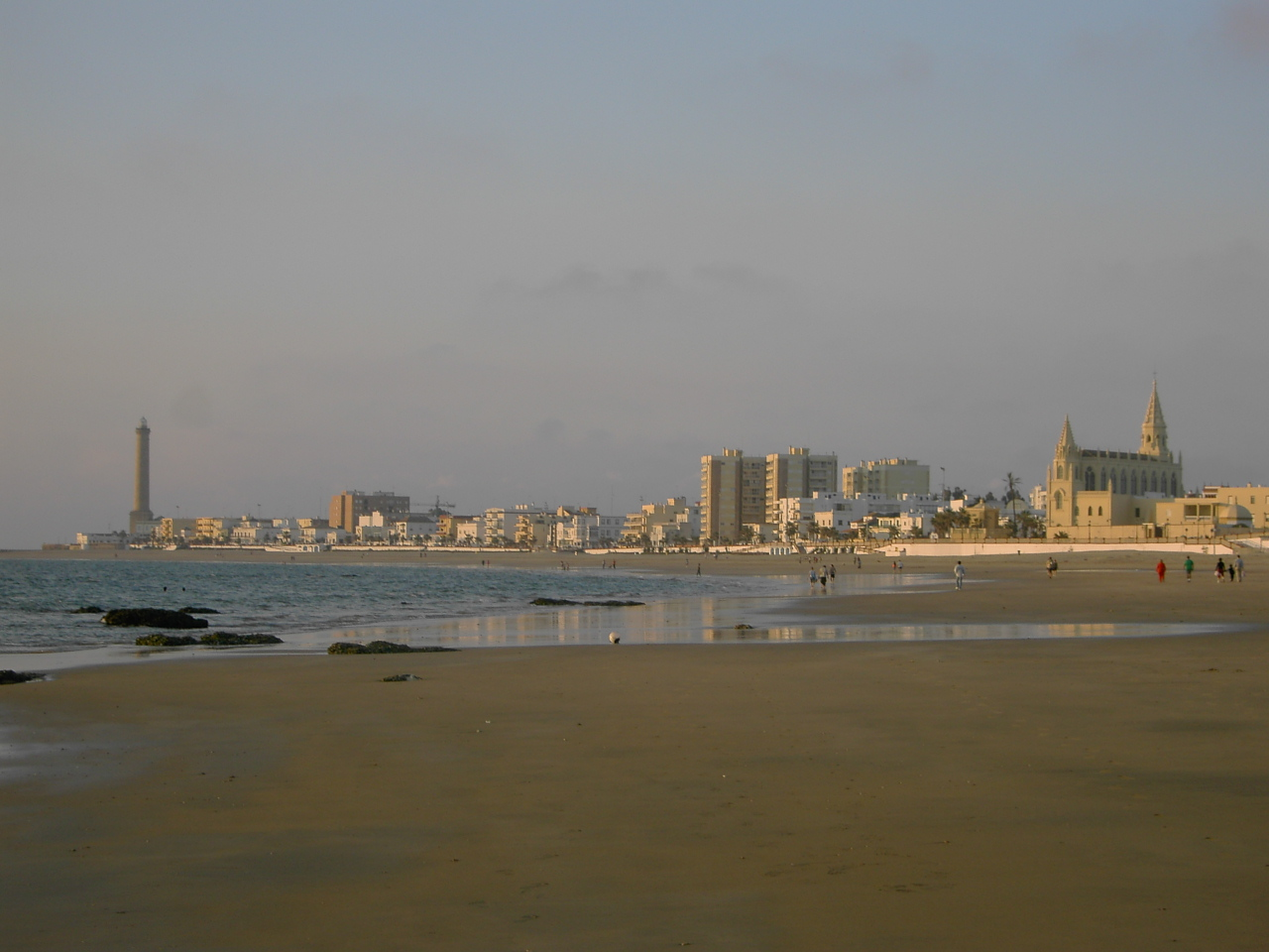 Chipiona von der Südseite